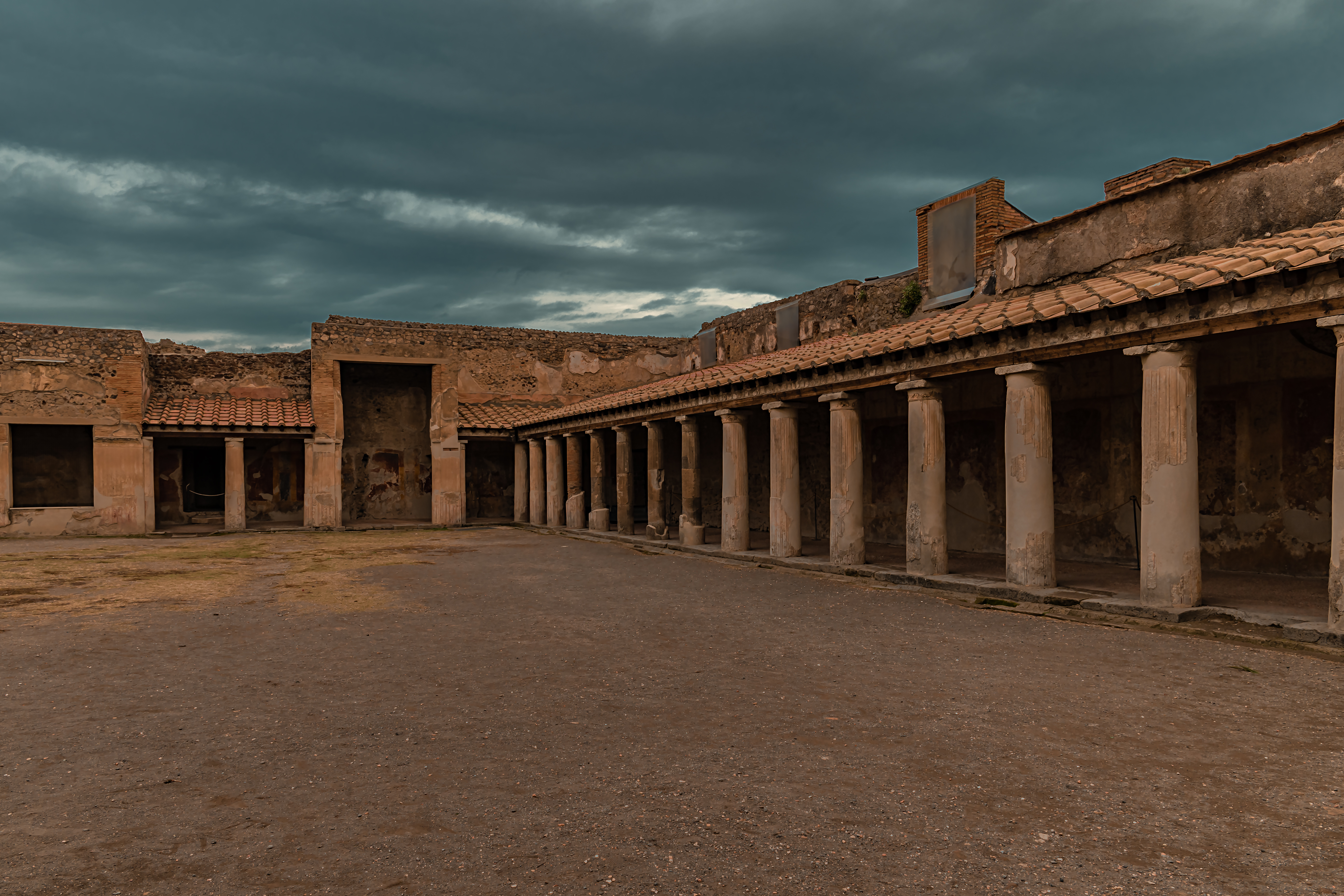 Der Innenhof der Stabianer Thermen in Pompeji